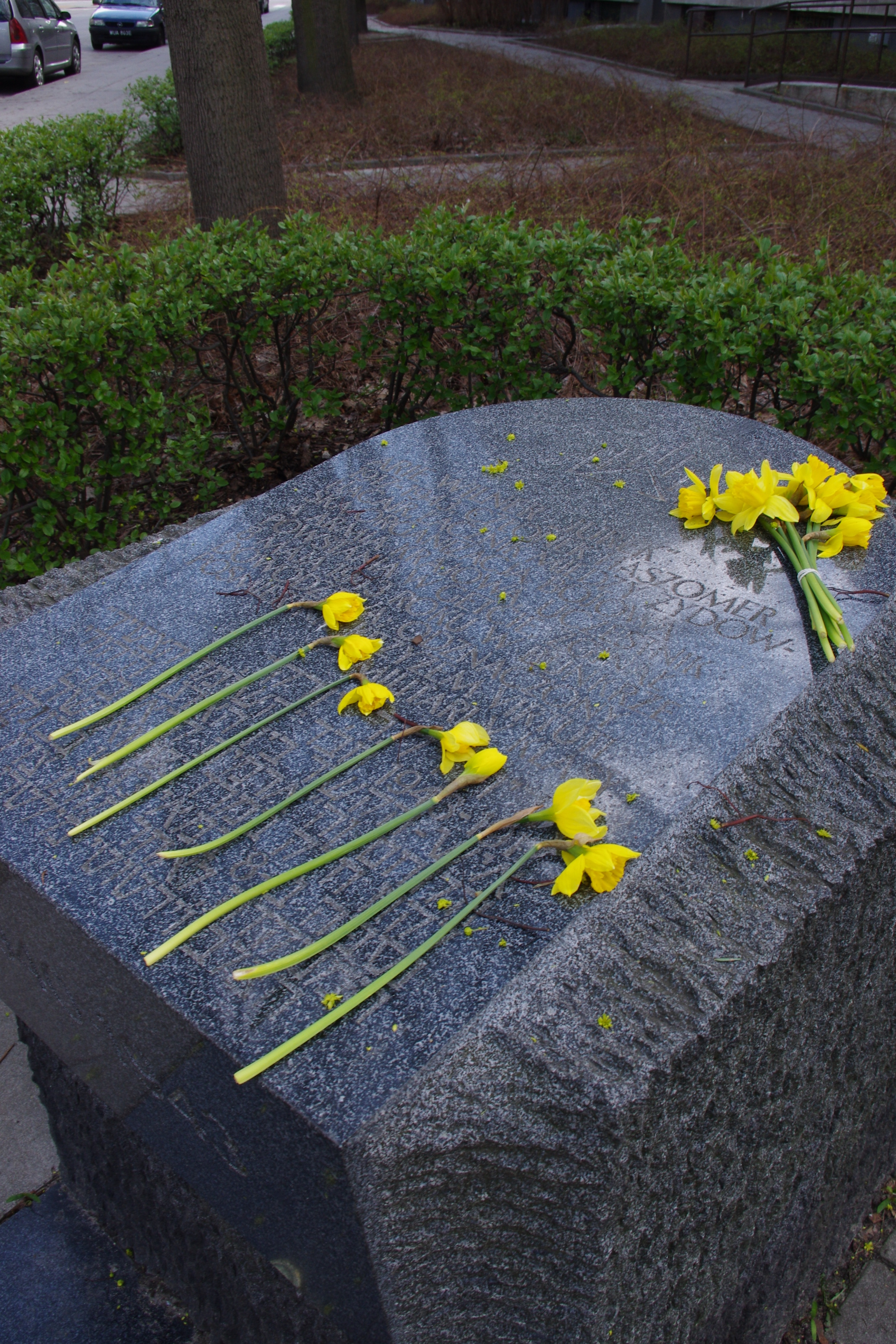 Kamień upamiętniający Arie Wilnera na ul. Zamenhofa w Warszawie